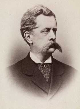 Carl Julius Lorck Eier: Oslo museum